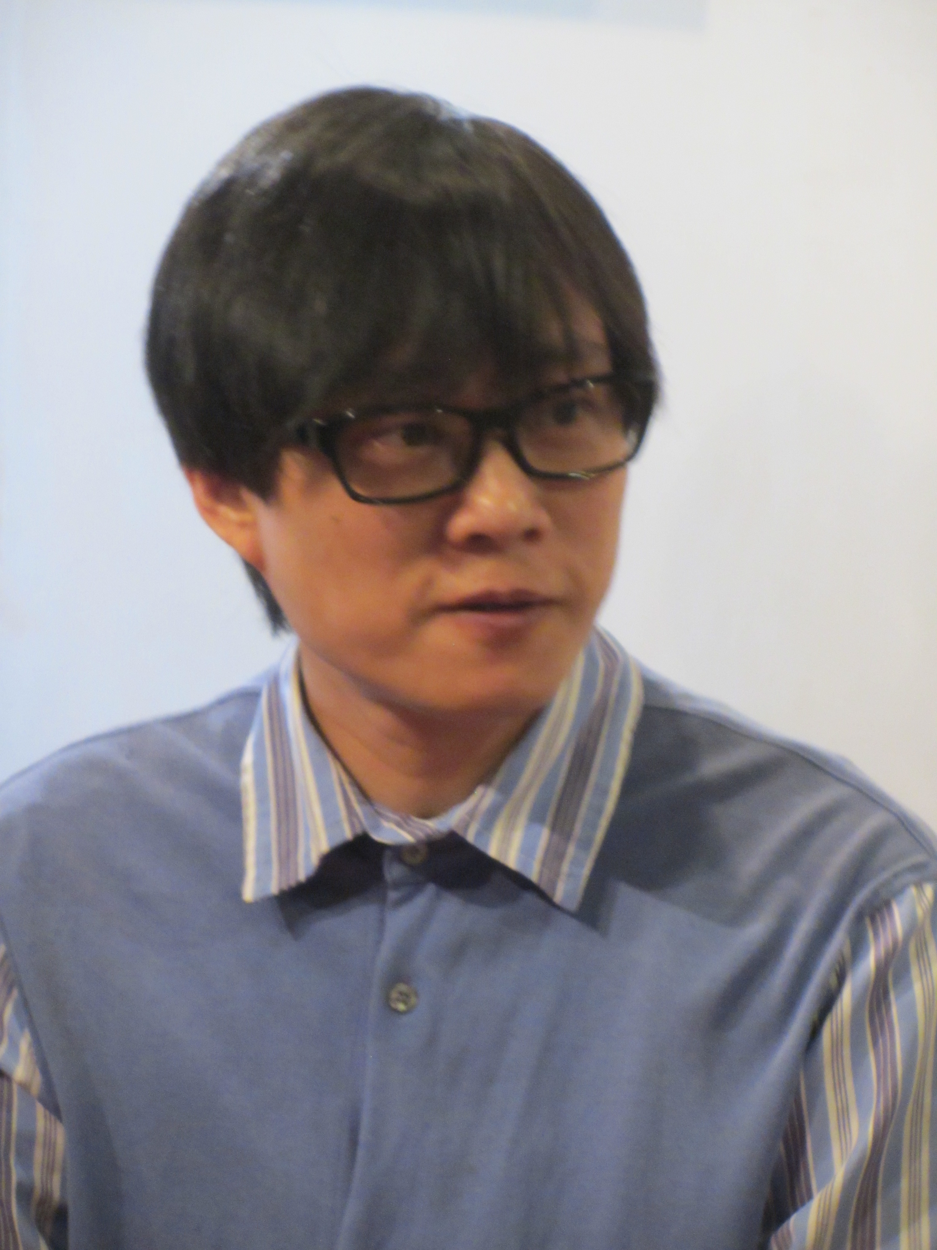 香港填詞人林夕在華文朗讀節高雄駁二藝術特區場